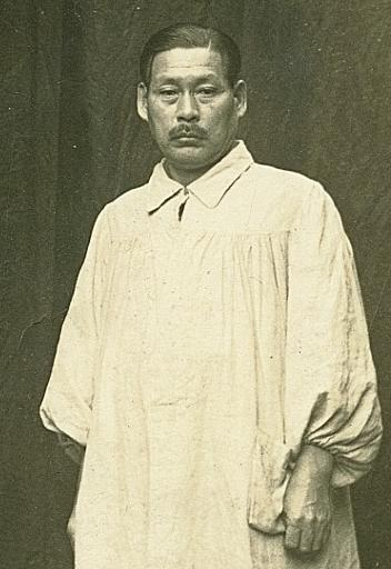 上田直次（うえだなおじ）１８８０年（明治１３年）２月１３日～１９５３年（昭和２８年）２月２１日 広島県出身の彫刻家 日展永久無鑑査